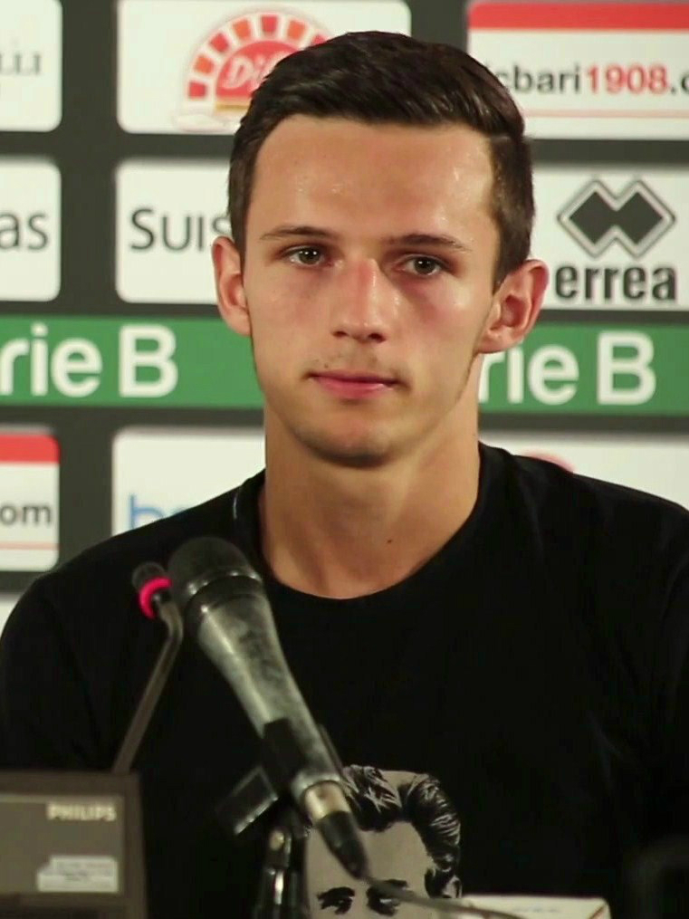 Rafał Wolski, piłkarz Lechii Gdańsk.